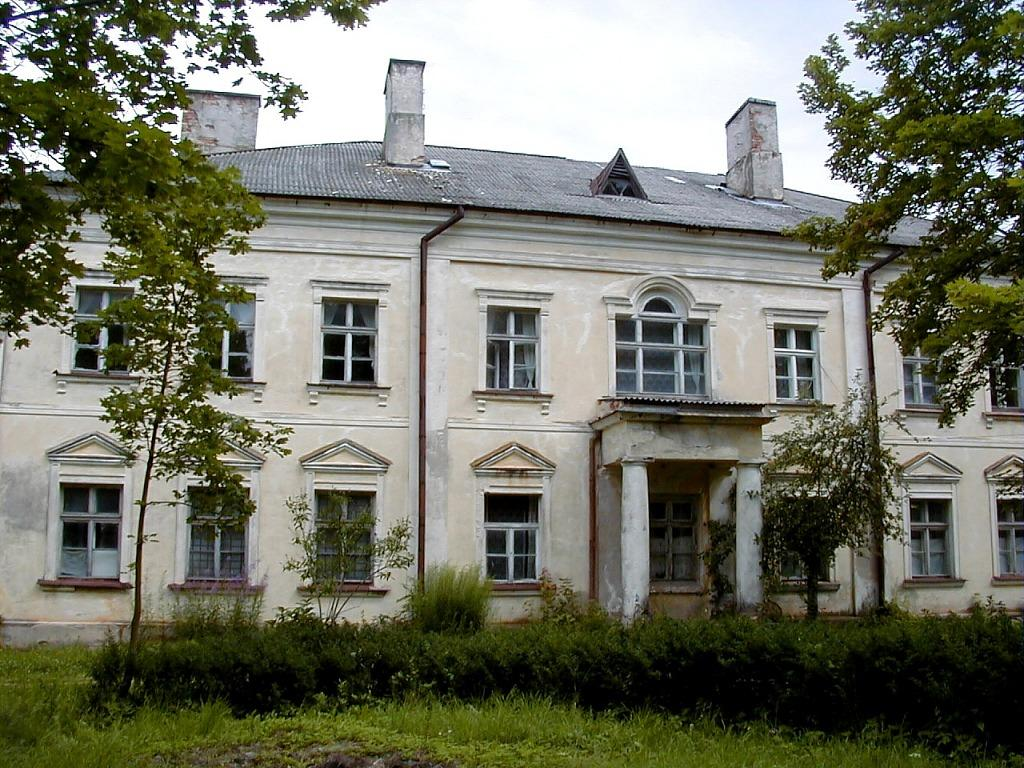 Viļānu muižas pils 2000-07-22